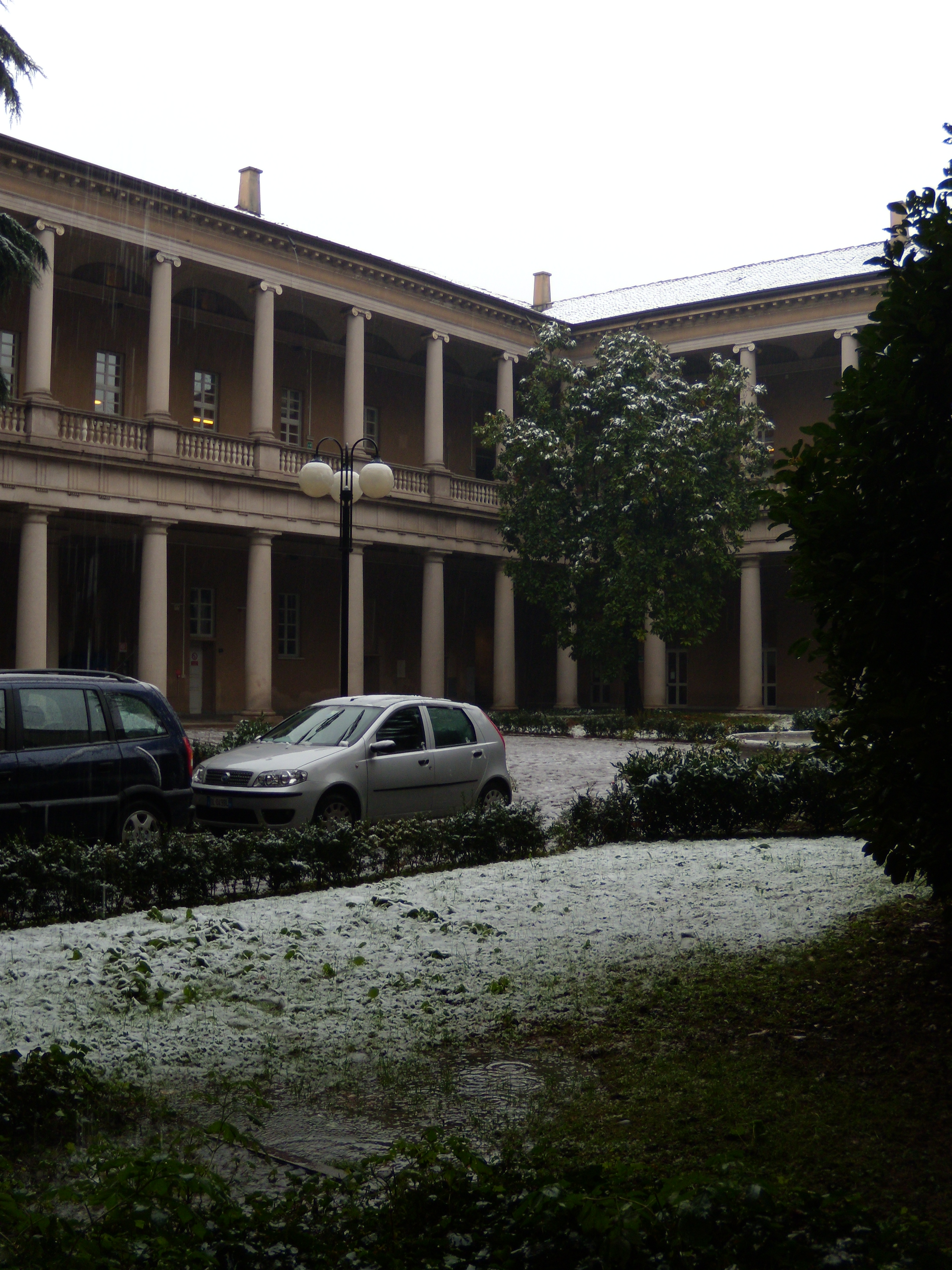 Il Liceo Zucchi, di Monza, innevato il 28 novembre 2008.